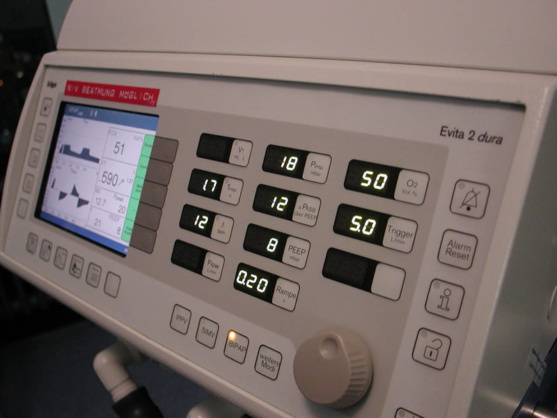 Intensivbeatmungsgerät 'Evita 2 dura' der Firma Draeger Medical Deutschland GmbH.